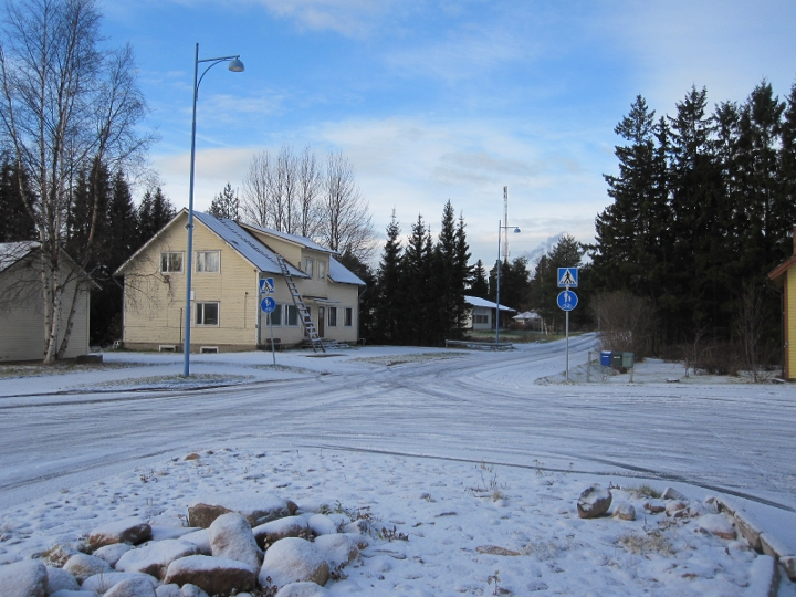 Näkymä Siikajoen kunnan taajaman Siikajoenkylän Sale-myymälän pihasta Kauppatielle (länteen, Raahen suuntaan).